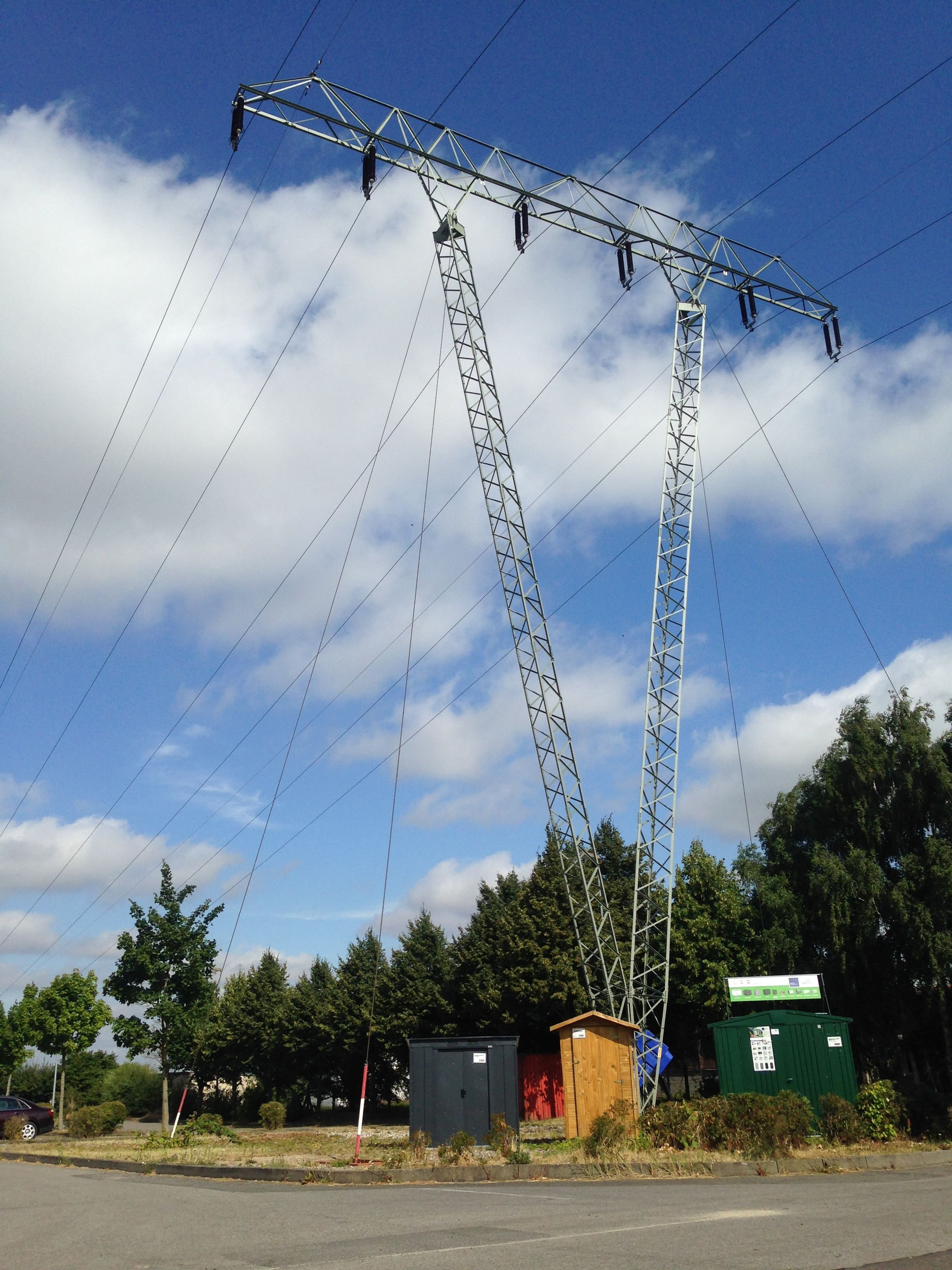 Seilverspannter Strommast der 110-kV-Freileitung Anklam–Bansin, hier bei Anklam